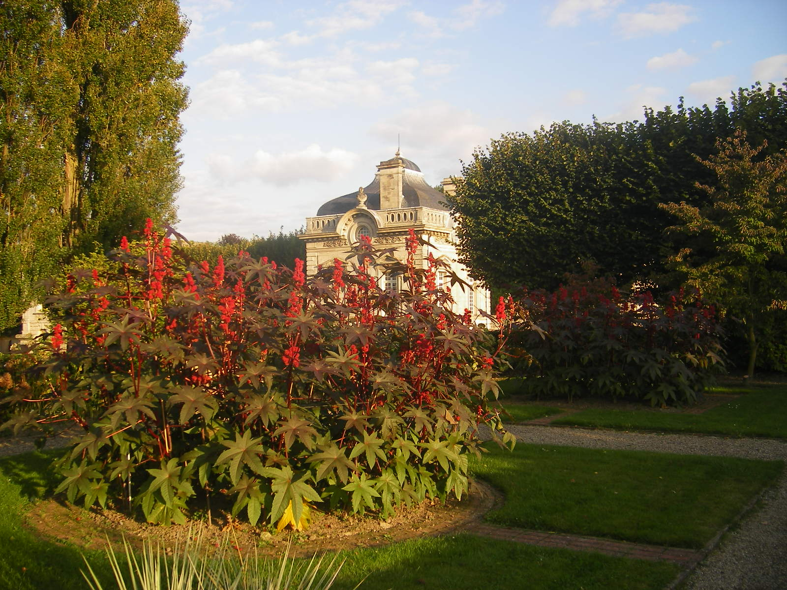 Blérancourt - castle park